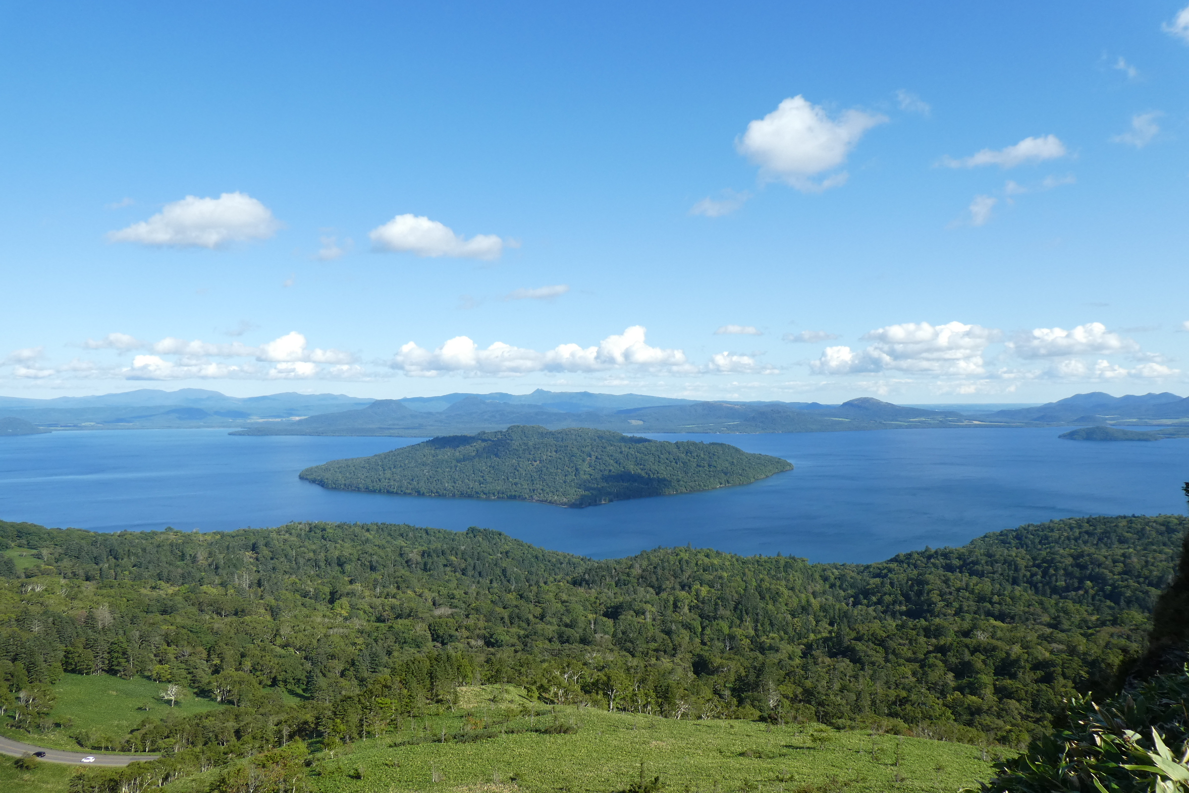 美幌峠から撮影した屈斜路湖